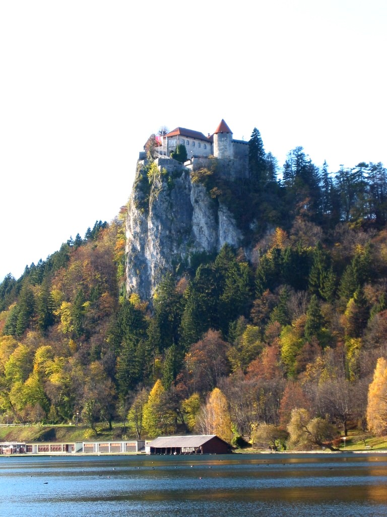 Blejski grad / Castle Bled